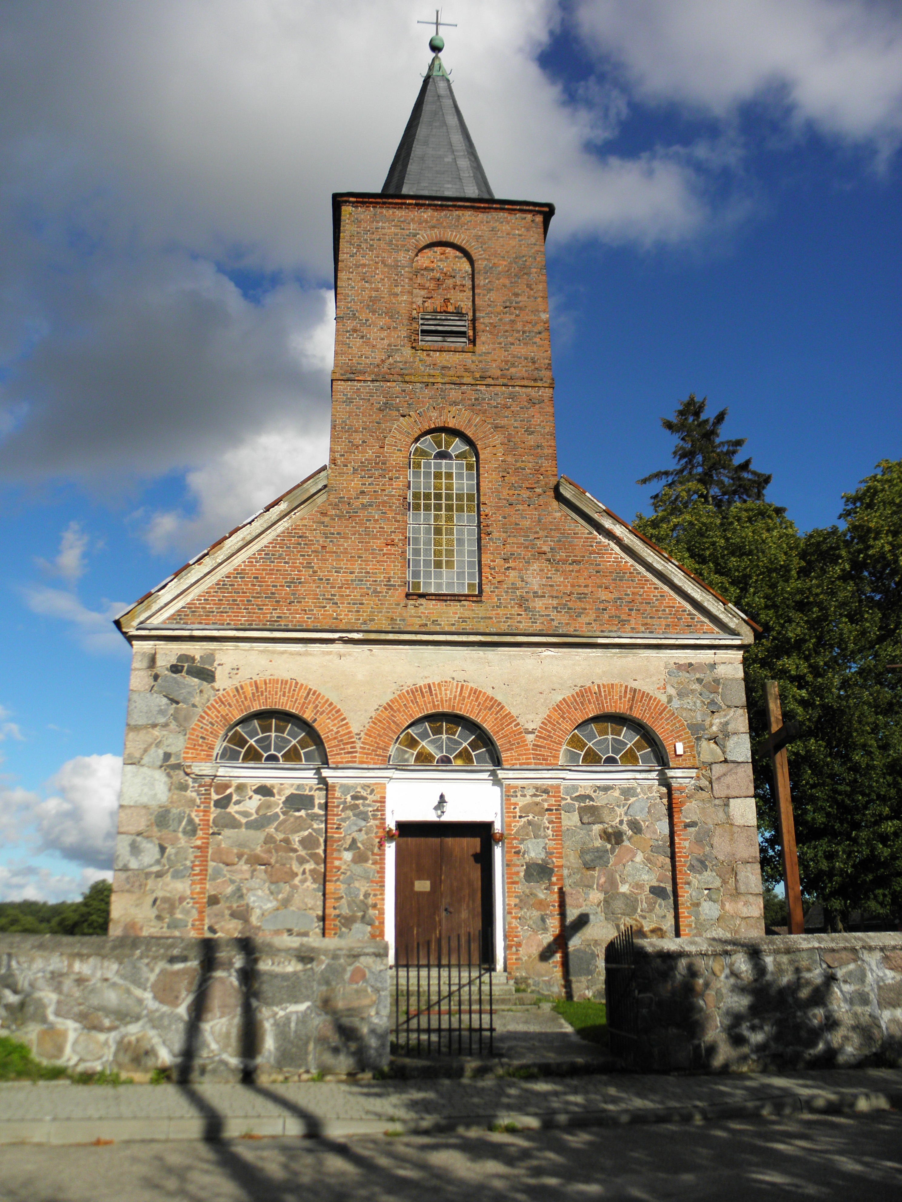 Kościół filialny p.w. Św.Józefa w Salinie